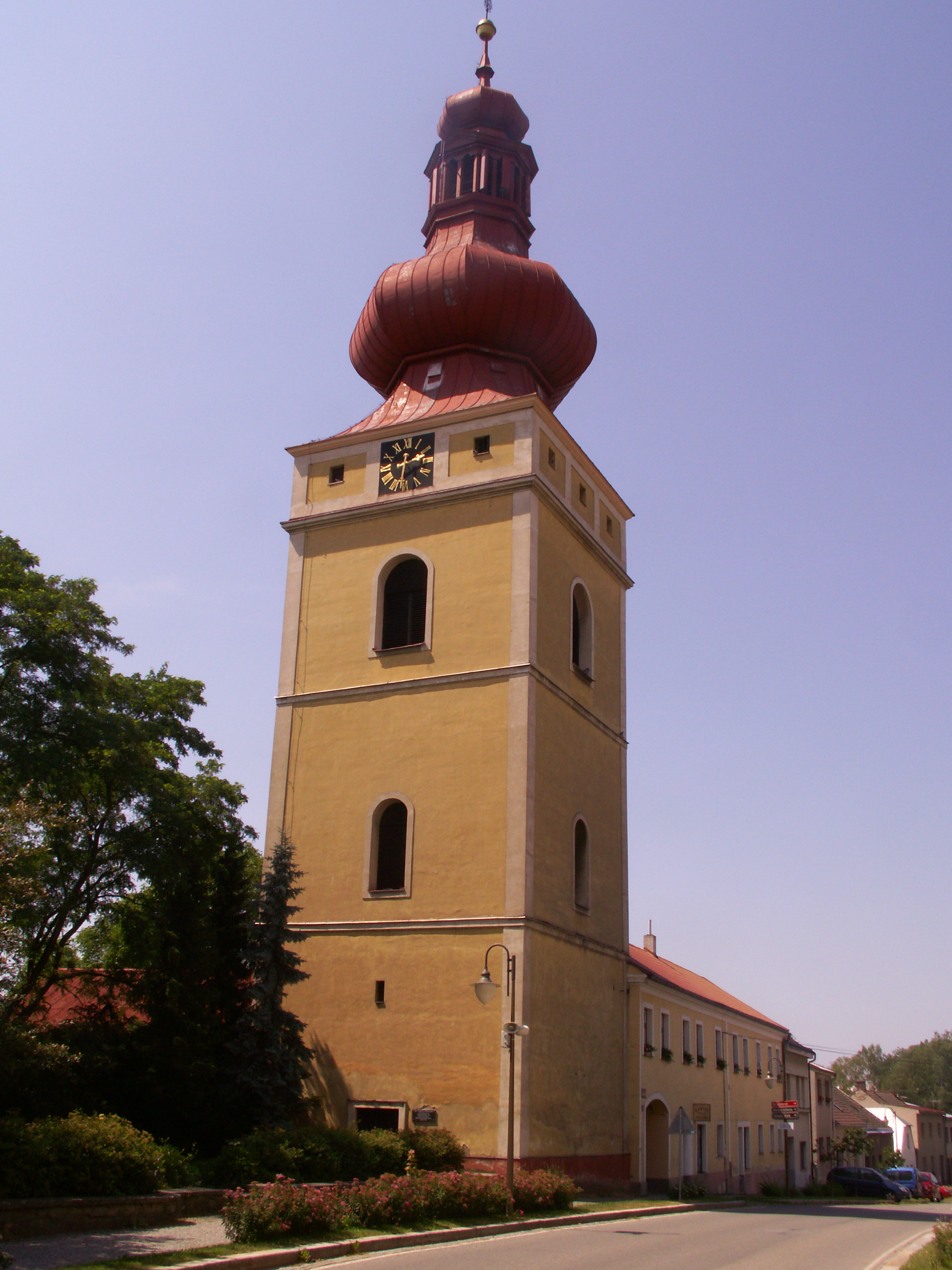 Golčův Jeníkov, okres Havlíčkův Brod, zvonice u děkanství, postaveno 1660, přestavba 1785, umístěn zvon z roku 1482, výška 49 metrů